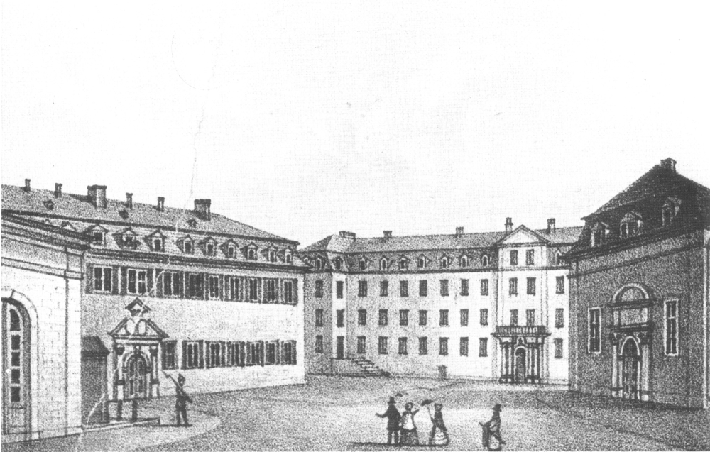 Ausschnitt aus der Lithographie "Hanau mit Umgebungen". Stadtschloss Hanau, vom Schlossplatz aus betrachtet. Links Kanzleigebäude, in der Mitte der Fürstenbau, rechts Marstall. (um 1870)